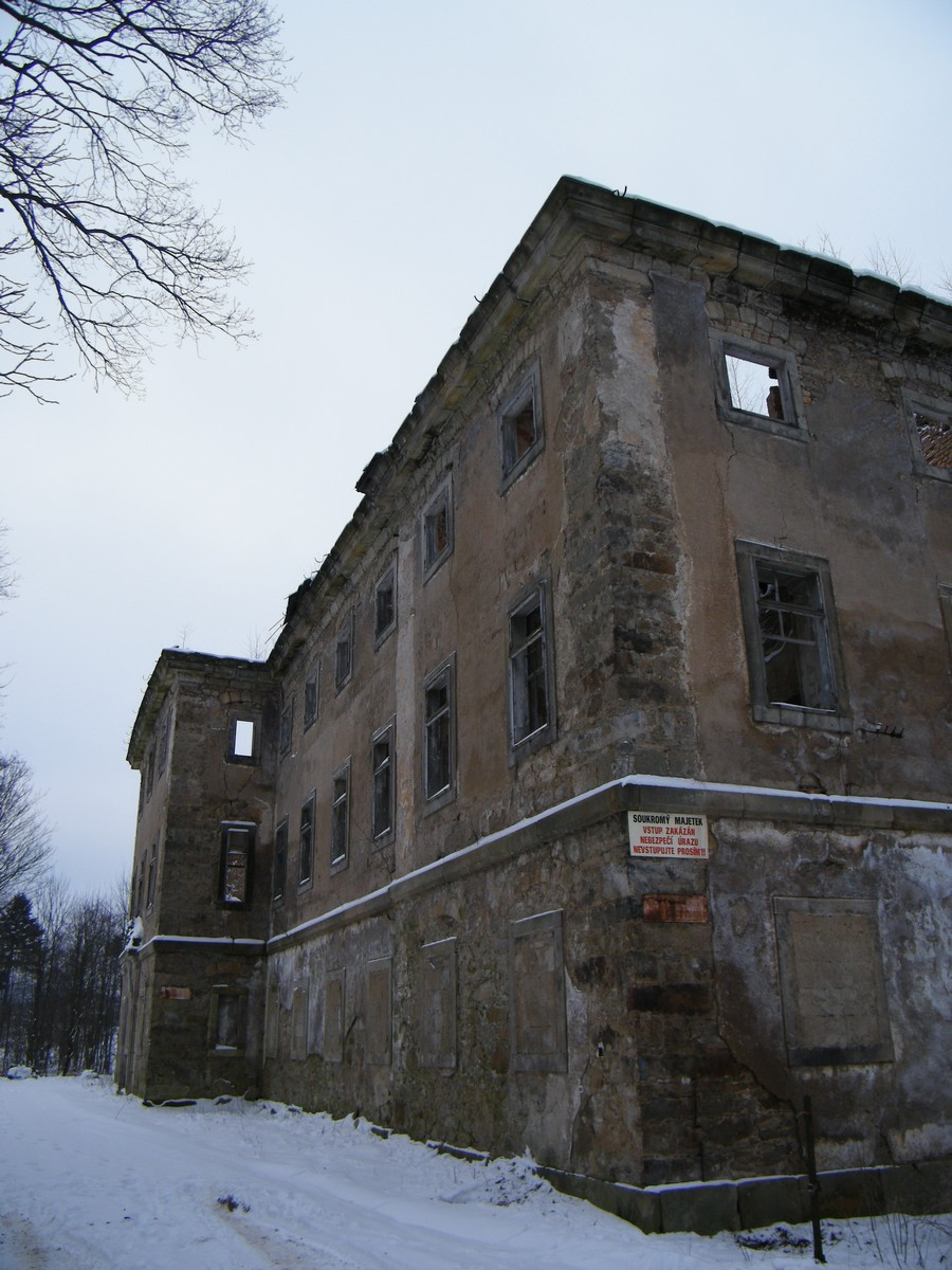 SV křídlo zámku Lipová